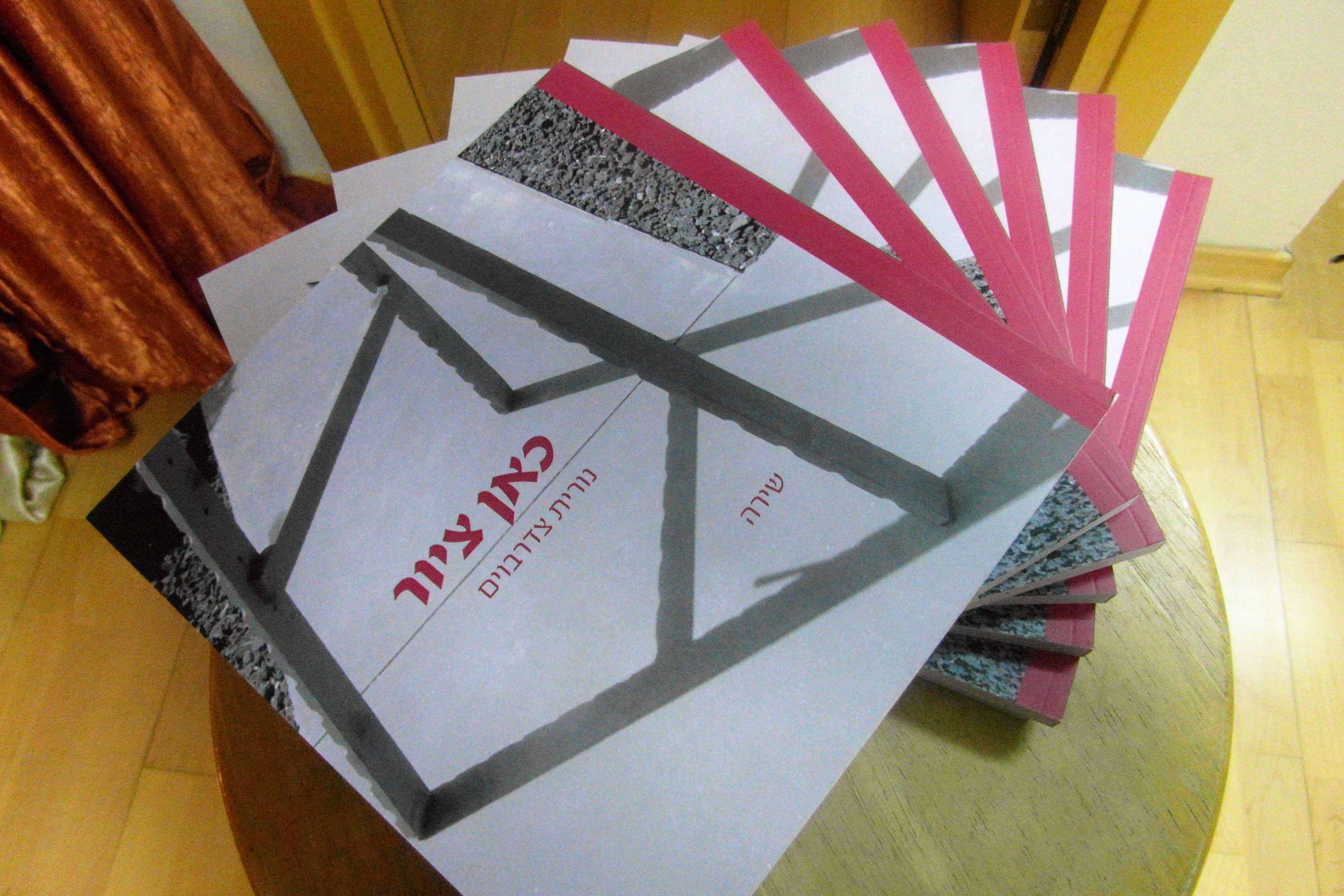 "כאן ציור" ספרה של נורית צדרבוים